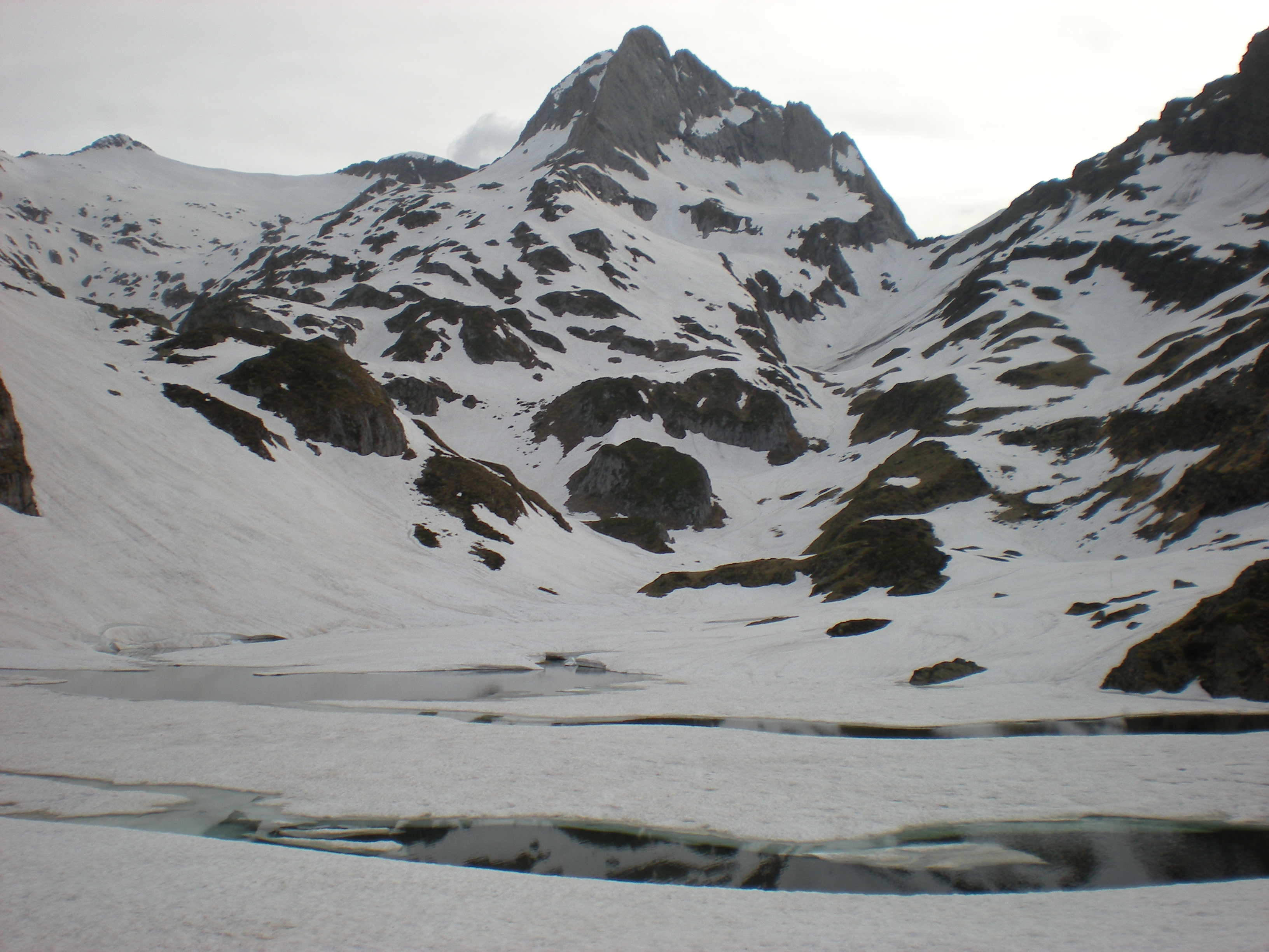 Vista del Lac deth Hòro a los pies de la Forcanada o Malh des Pois